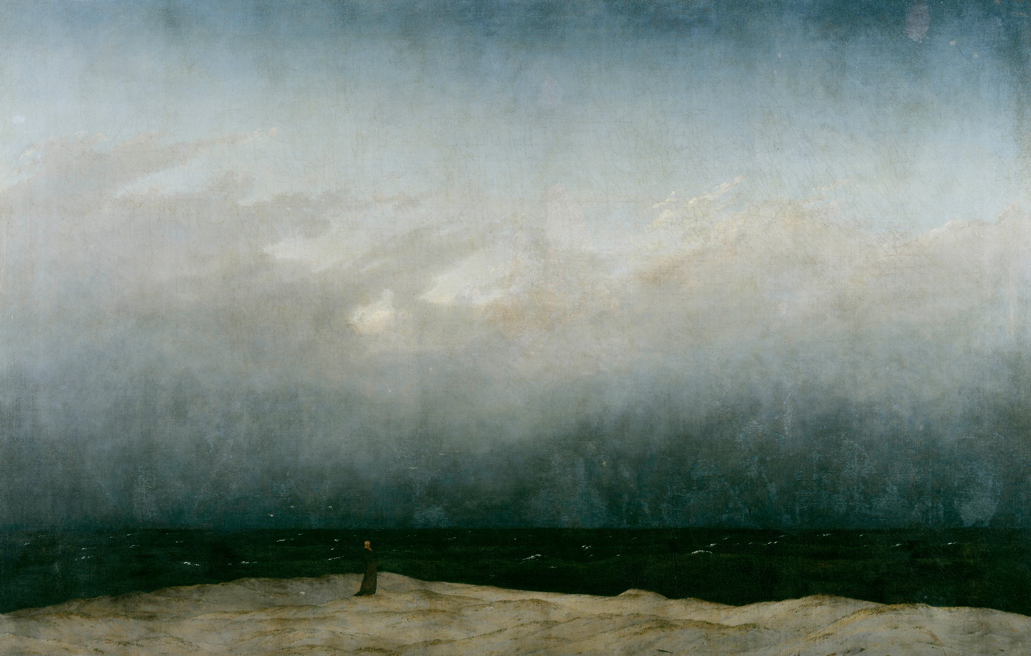 Zustand vor der Restaurierung